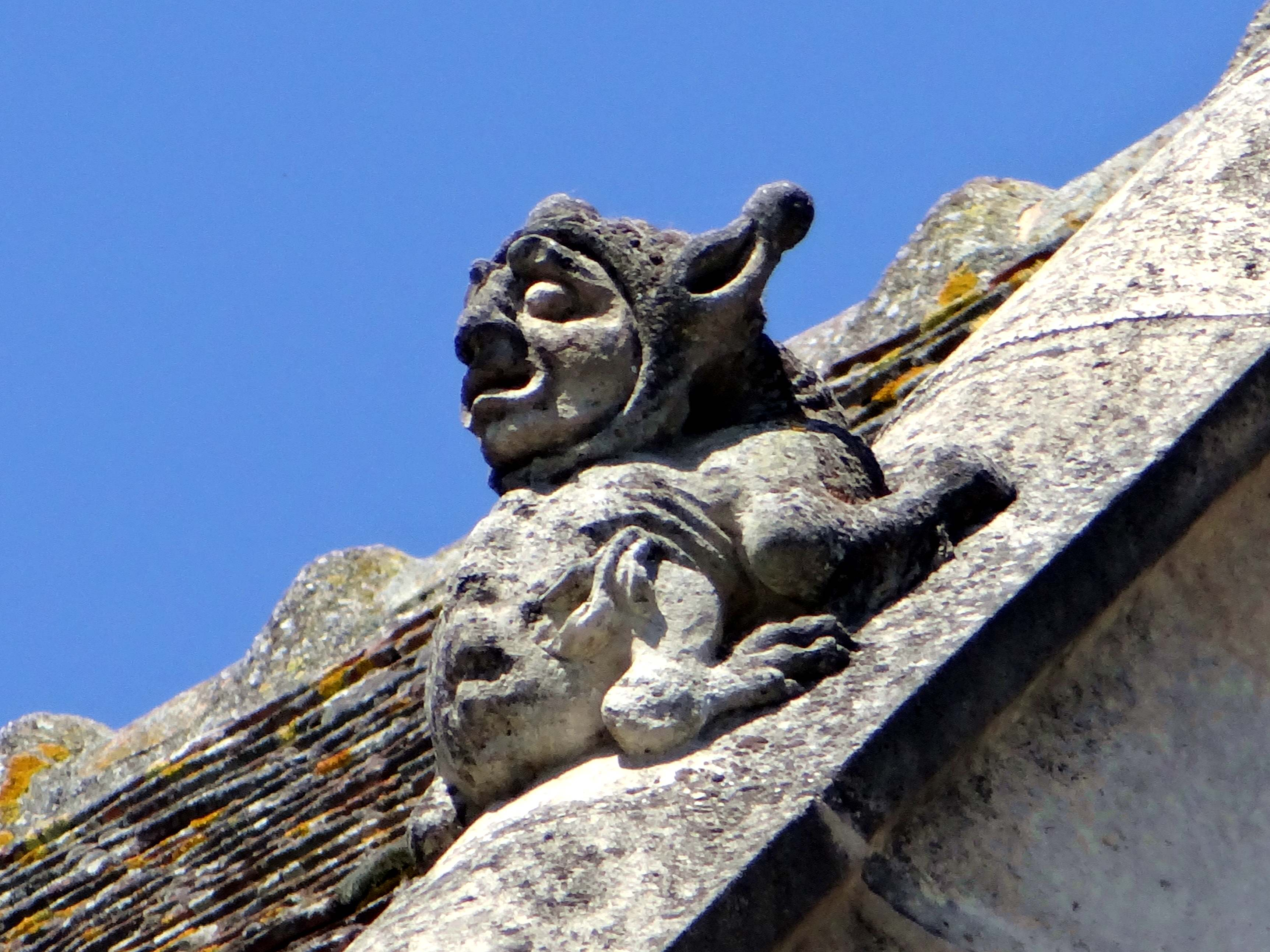 Église Saint-Michel du Mesnil-en-Thelle - voir titre.